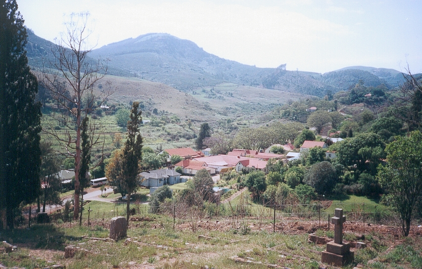 Copyright : Candiotti / FC Georgio Sujet : Pilgrim Rest, Lieu : Eastern Transvaal (Mpumalanga), Afrique du Sud Date : 1998